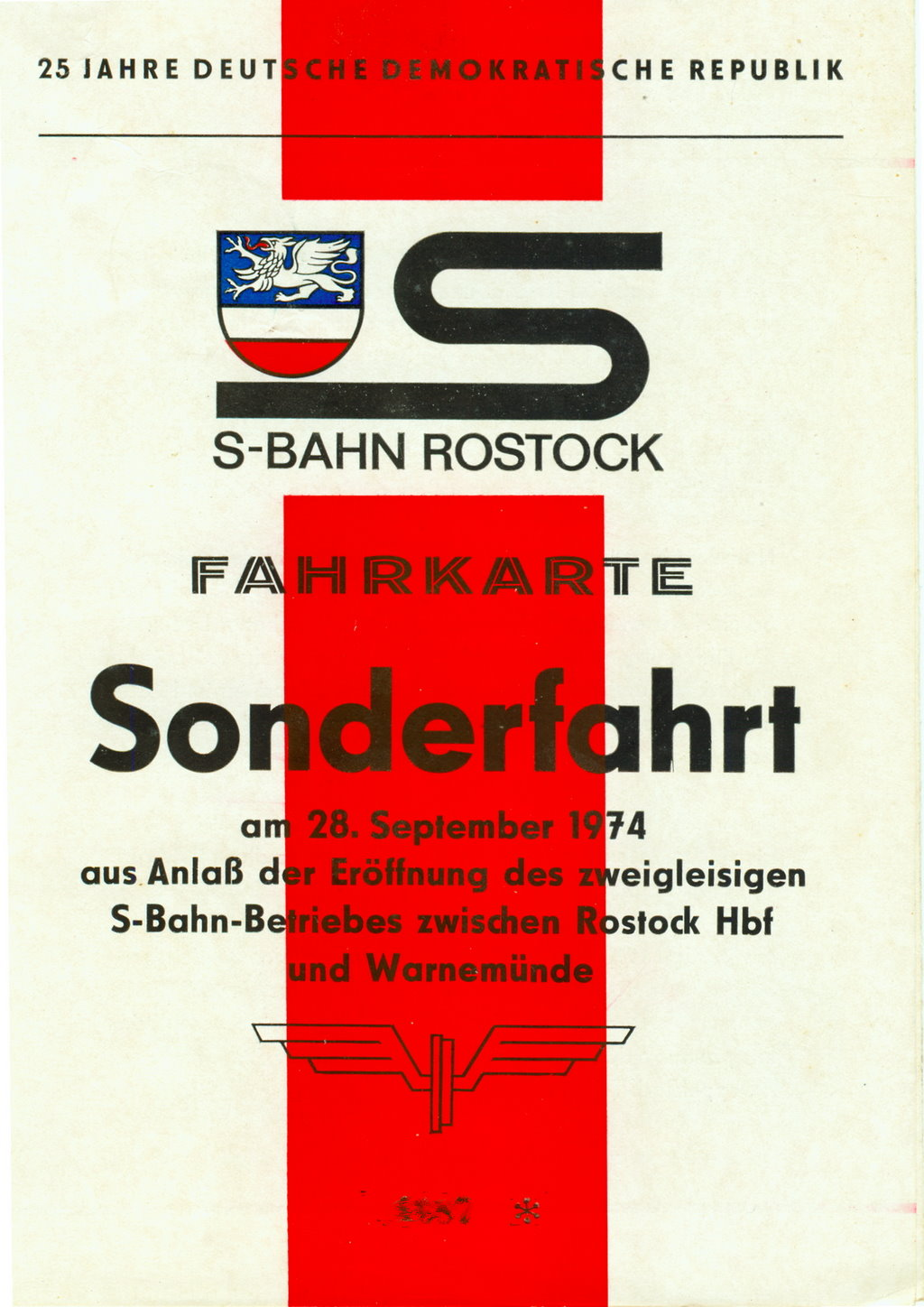 Sonderfahrkarte anlässlich der Eröffnung der neuen S-Bahn Strecke von Rostock nach Warnemünde.